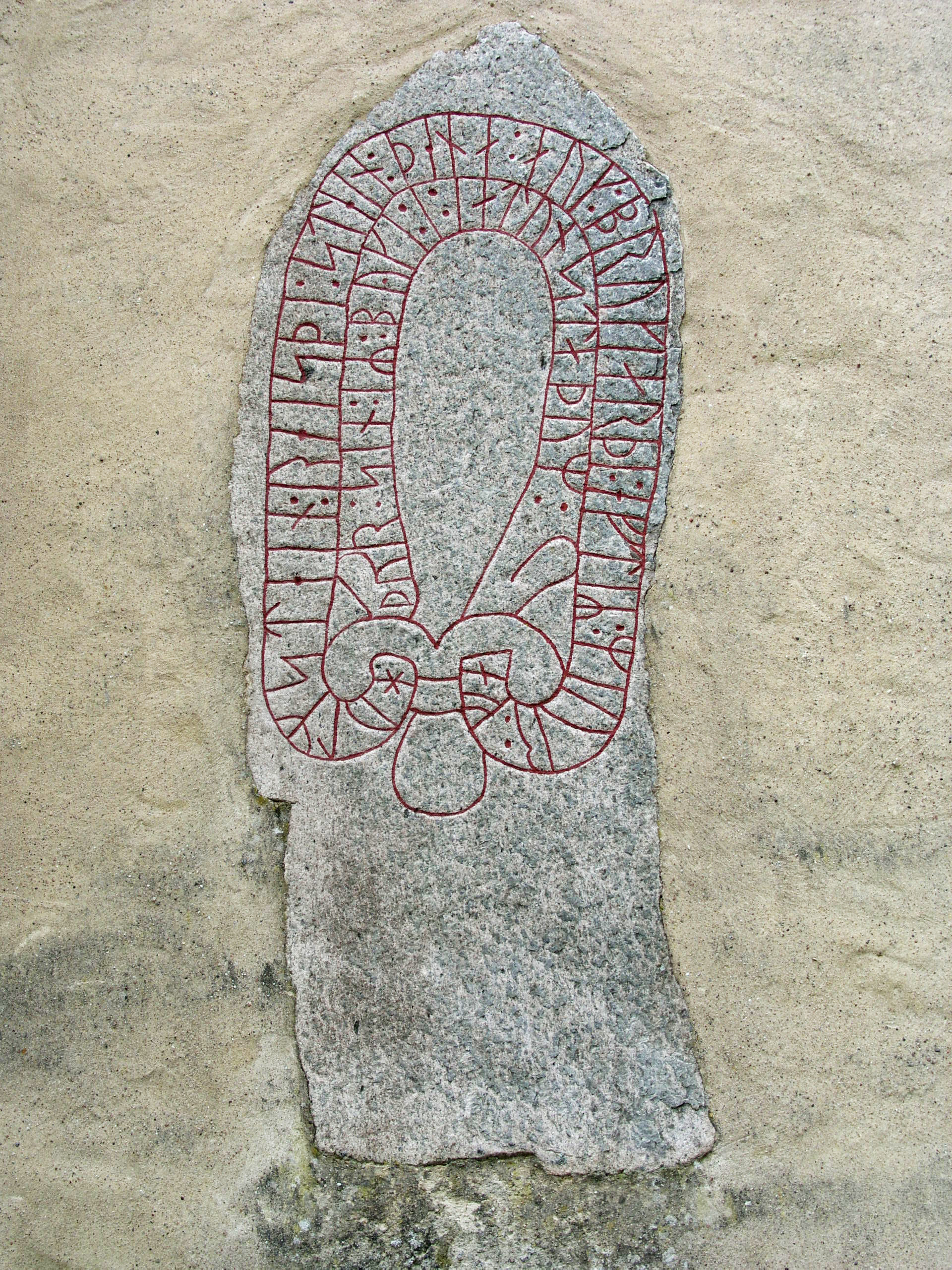 Heda kyrka, Ödeshögs kommun. Runestone. Östergötlands runinskrifter 132.